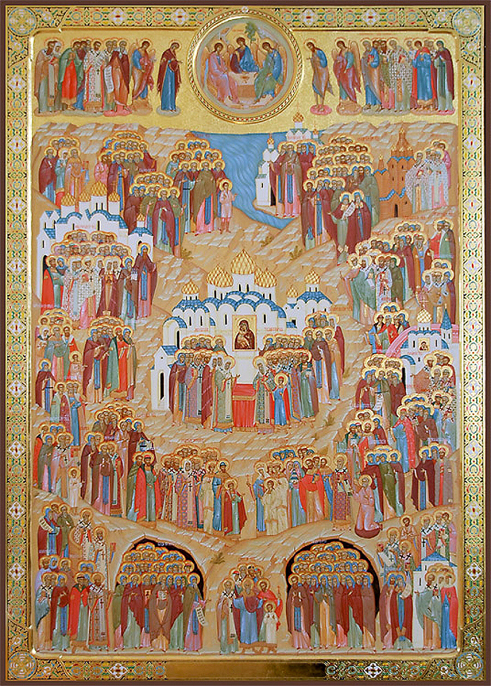 Собор святых в земле русской просиявших